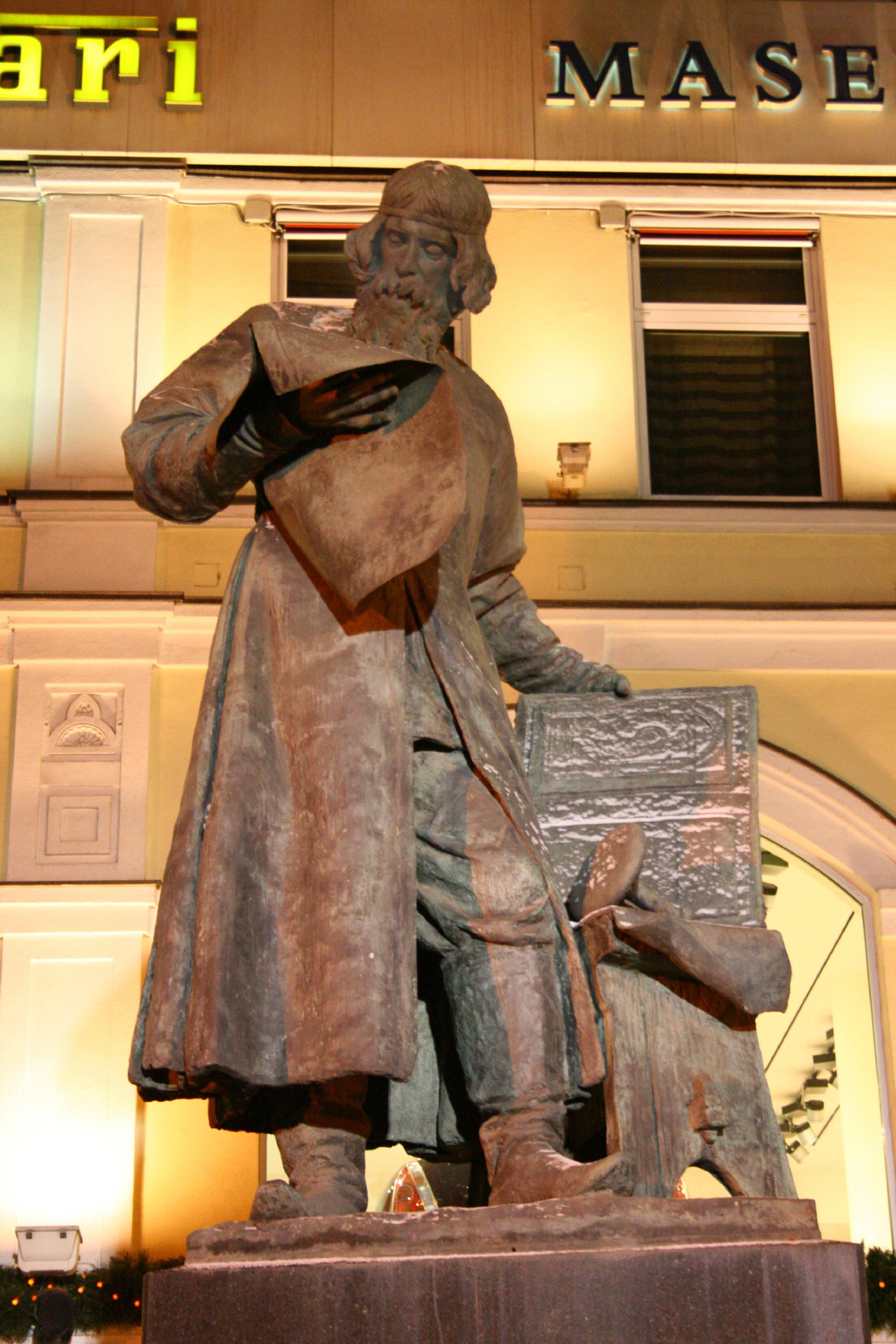 Памятник Ивану Федорову в Москве